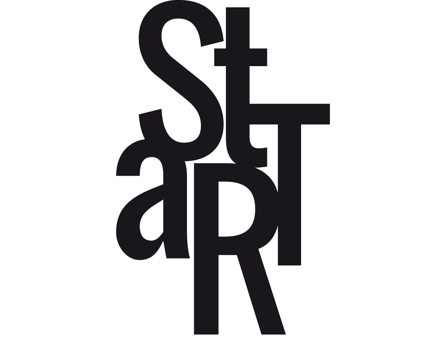 Obecne logo FTS START